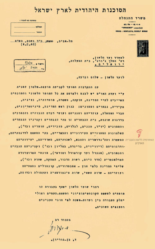 מכתב מבן גוריון אל ועד הלשון 1948